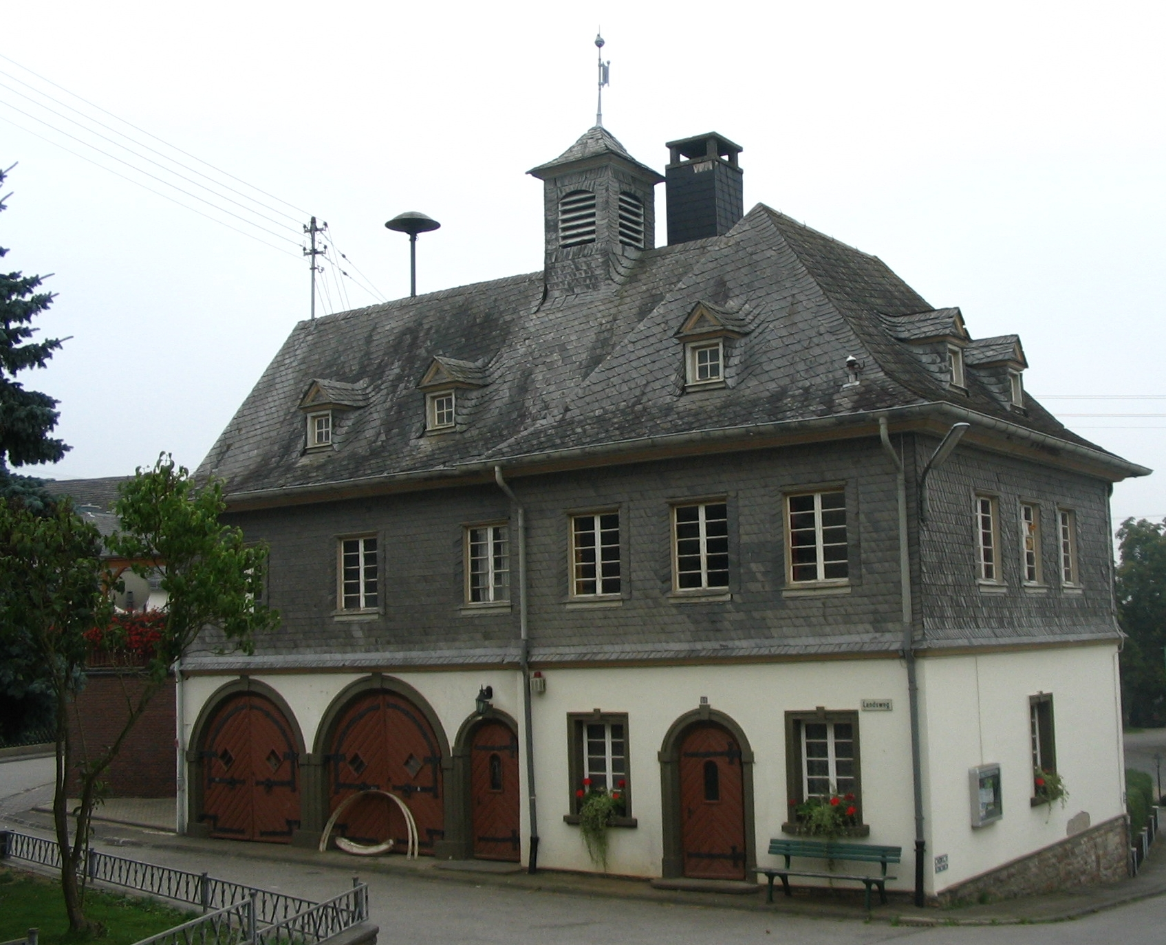 Sargenroth/Hunsrück